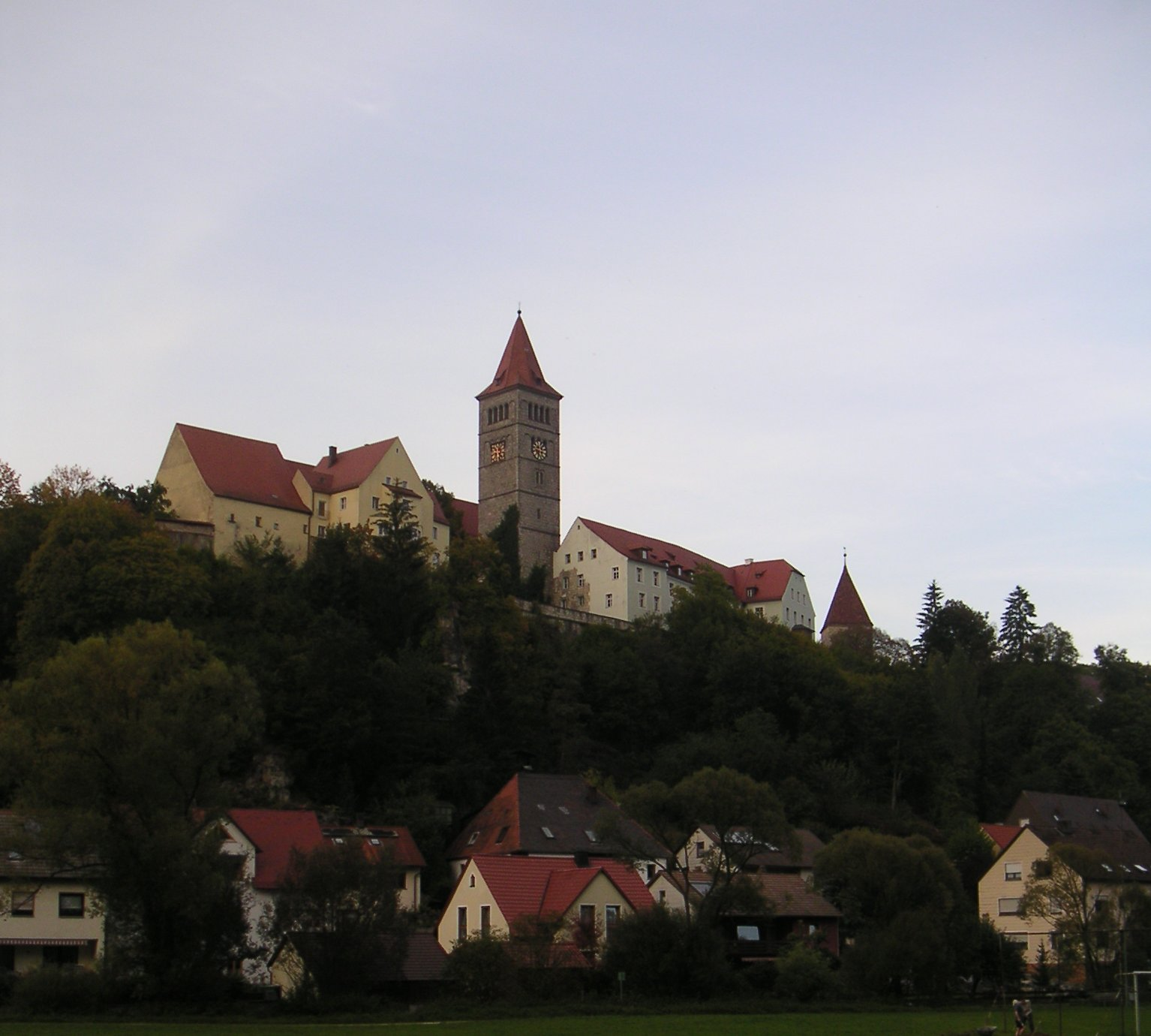 Klosterburg Kastl, Seitenansicht